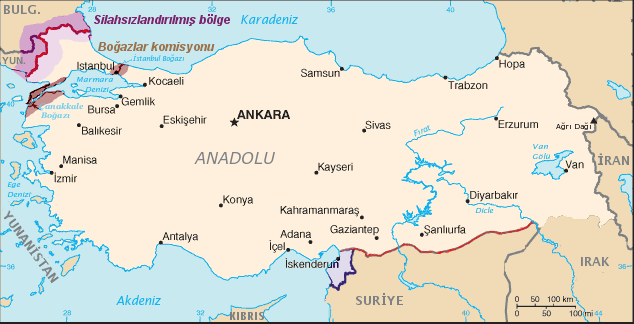 Lozan Antlaşması